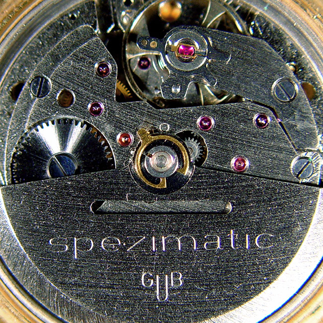 Beschreibung: Uhrwerk einer Glashütte-spezimatic-Armbanduhr aus den 1980er Jahren Aufnahmedatum: 22. Oktober 2002 Fotograf: ArtMechanic